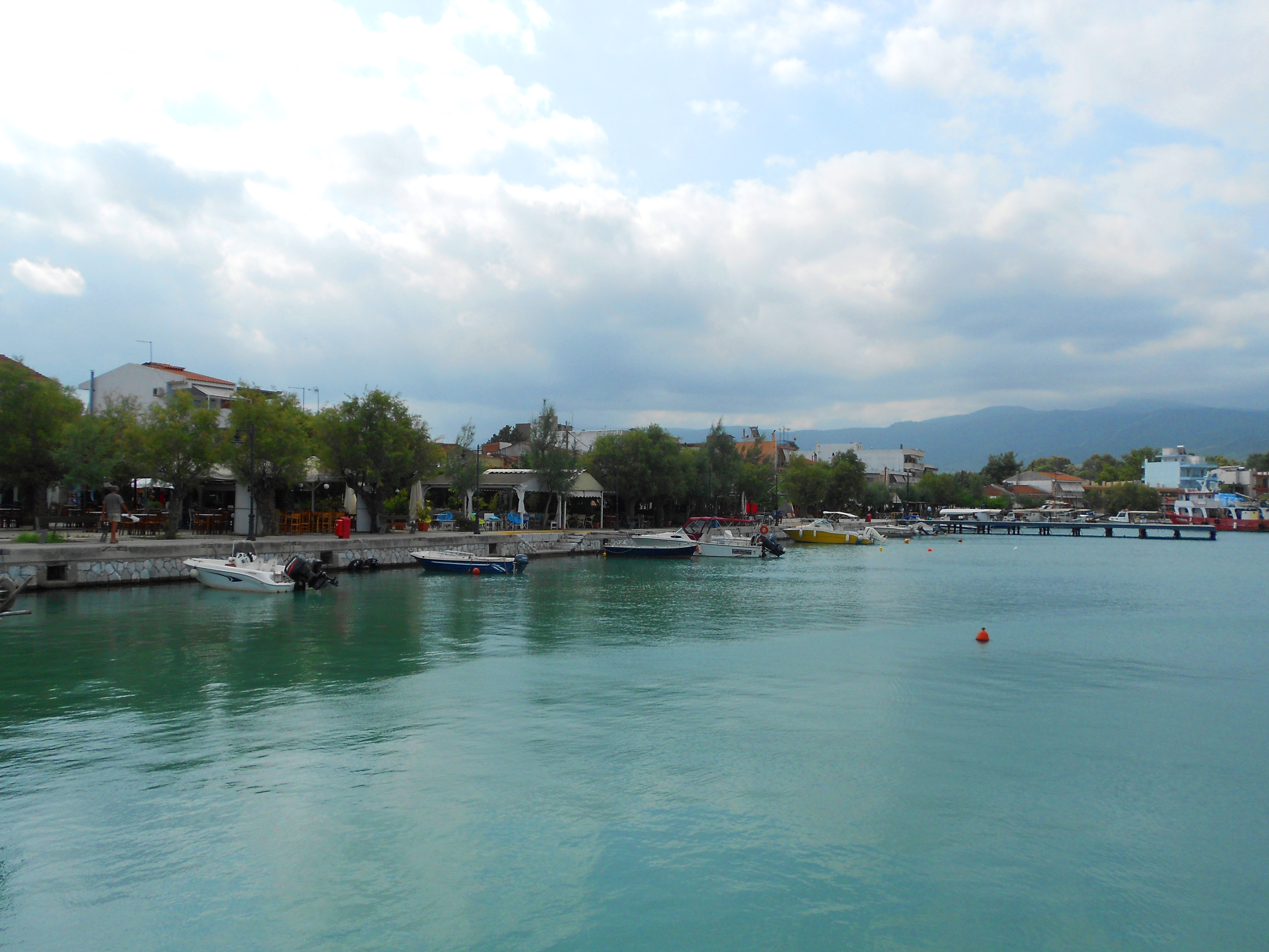 Παραλία